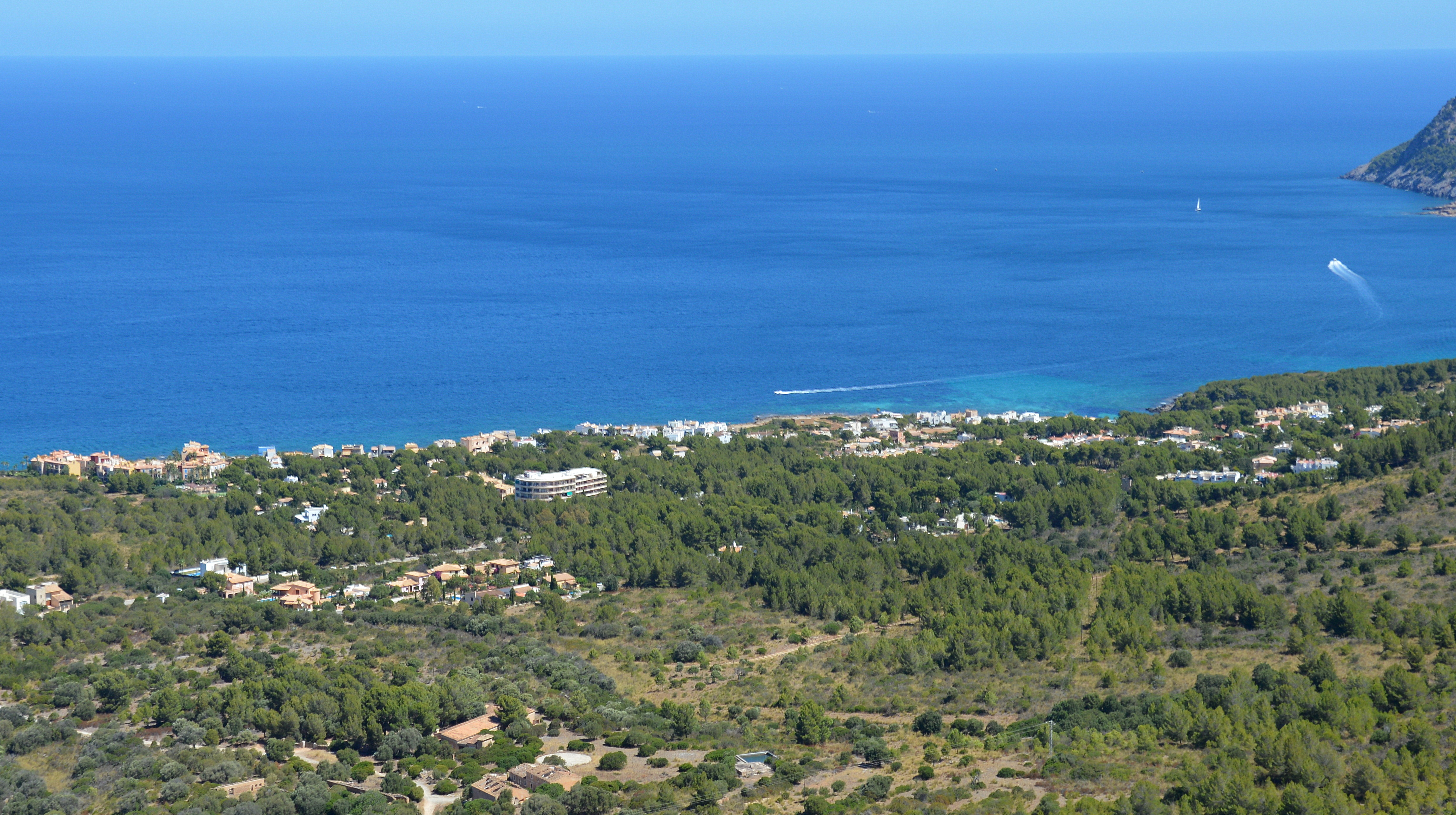 Blick auf Betlem